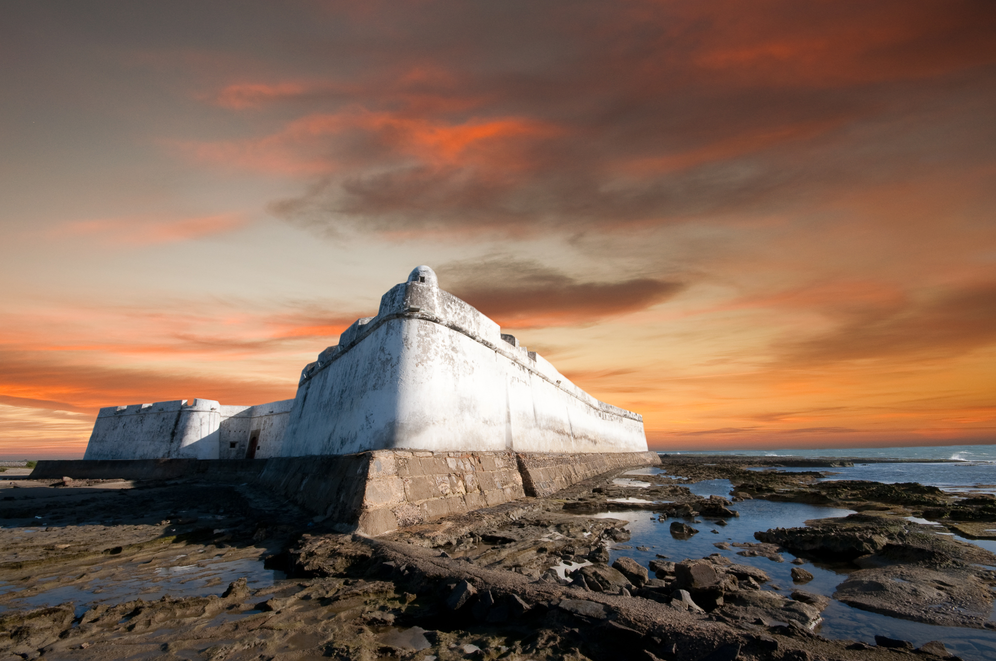 Natal - RN